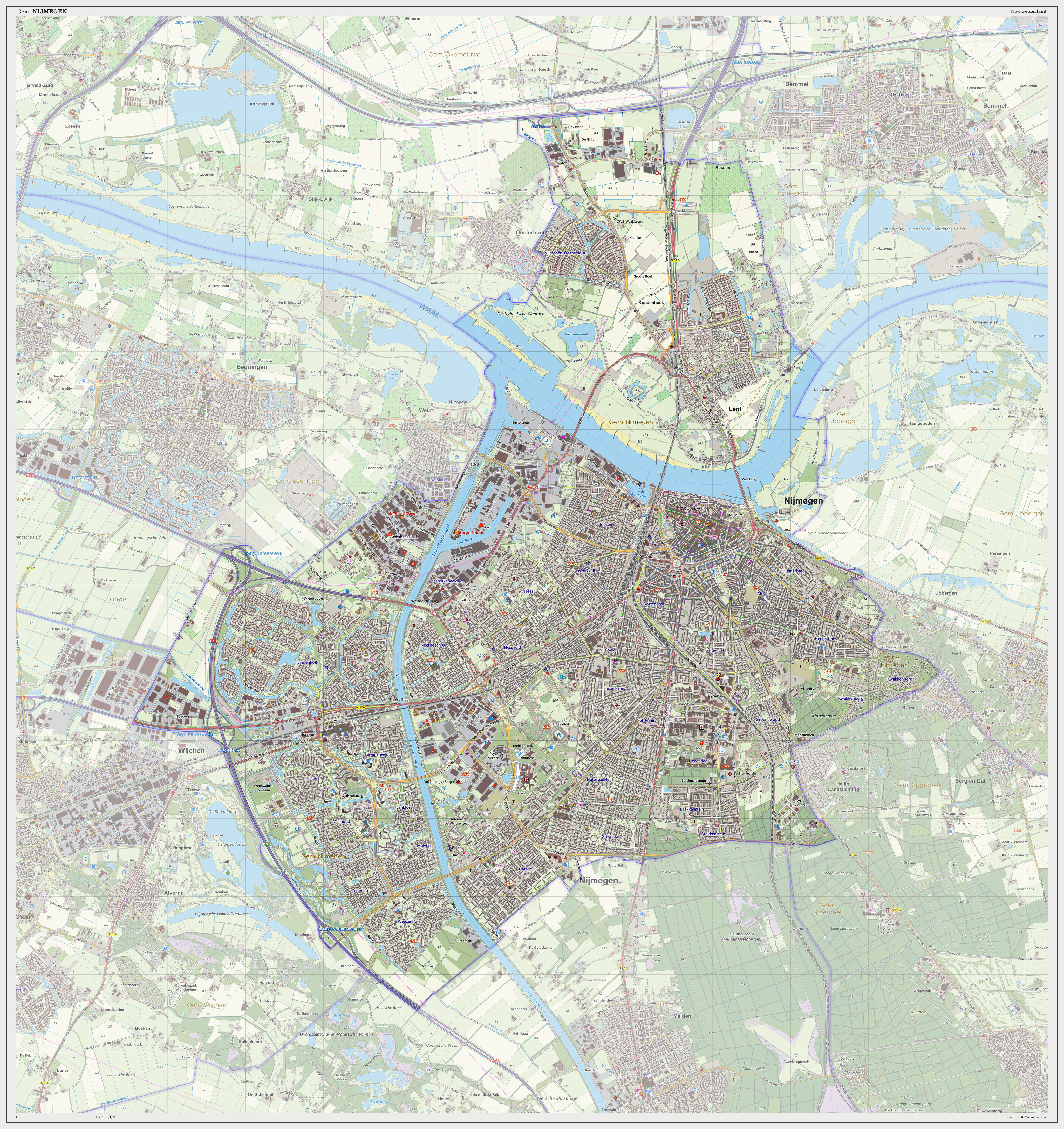 Topografische gemeentekaart. Resolutie: 300 pixels/km. Kaartbeeld samengesteld met de open geodata van de Top10NL en Top25namen (Basisregistratie Topografie, Kadaster 30-nov-2013), o.b.v. Creative Commons BY licentie. Gebouwvlakken uit Open Geodata BAG extract (8-dec-2013). Wegen uit de OpenStreetMap (15-dec-2013). Samenstelling en kleurenschema: Jan-Willem van Aalst, met QGIS2 en Adobe Photoshop. Zie ook de Legenda.